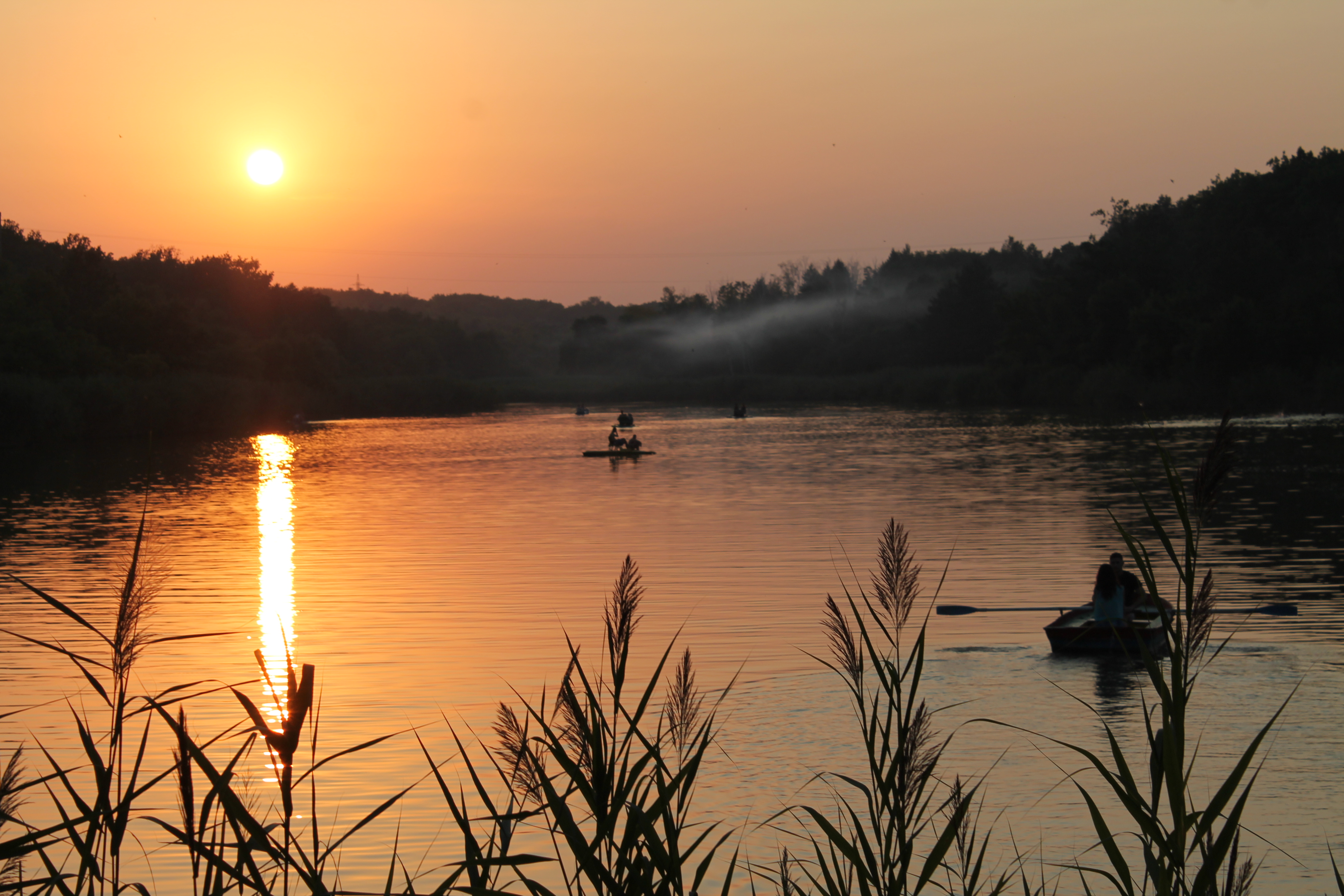 Lacul Comsomoliștilor, mun. Bălți